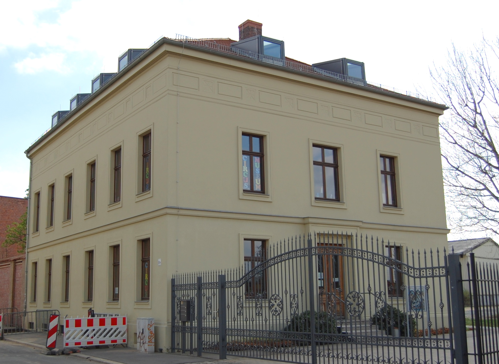 Villa von Rudolf Wolf in der heutigen Karl-Schmidt-Straße in Magdeburg-Buckau